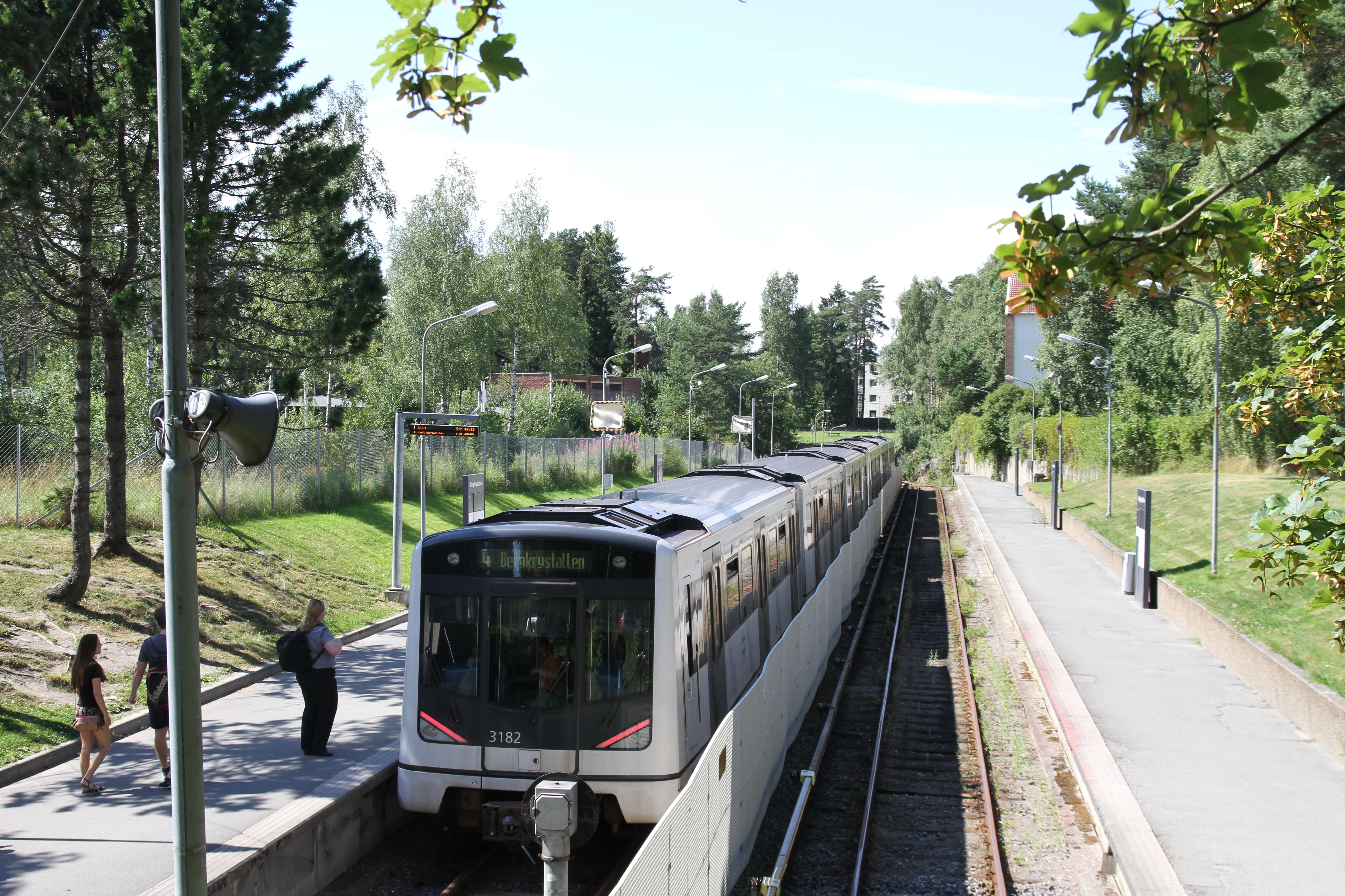 Bergkrystallen stasjon.